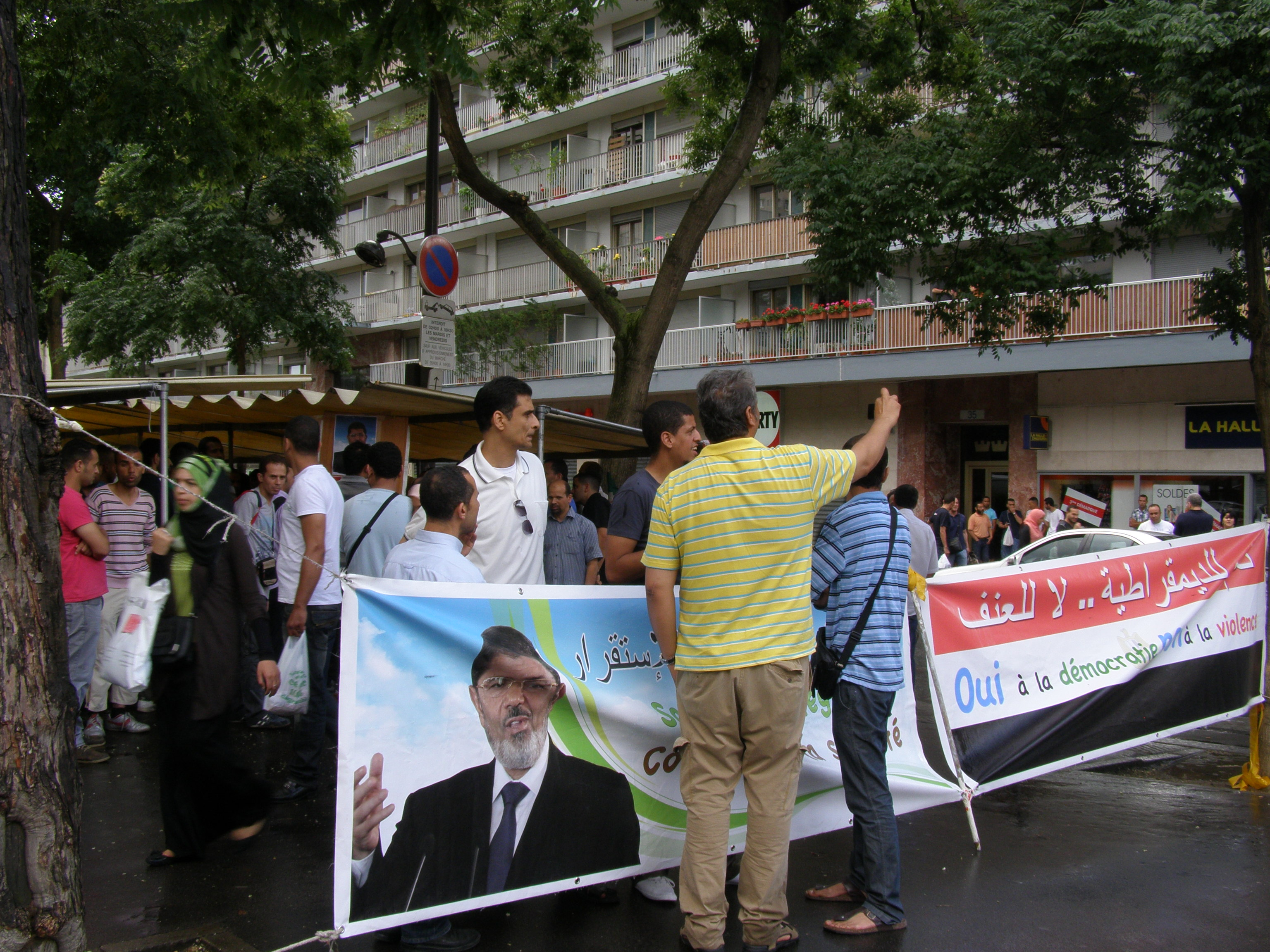 La manifestacio subtene al Mohamed Morsi. Boulevard de Belleville (la 20-a arondismento), Parizo, Francio.